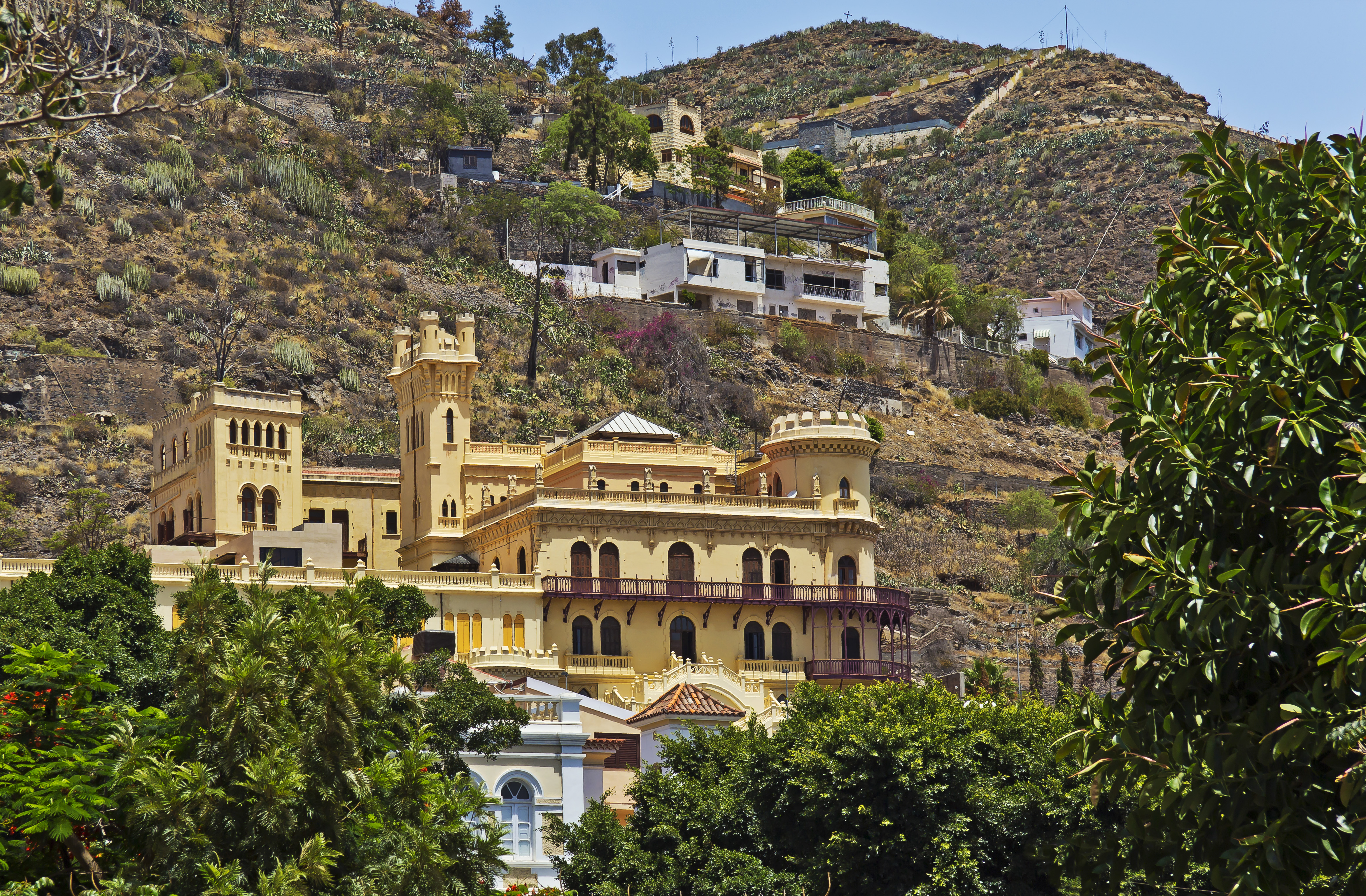 Das Gebäude der Escuelas Pías in Santa Cruz de Tenerife wurden Ende des 19. Jahrhunderts von Mario Estanga y Arias Girón entworfen.